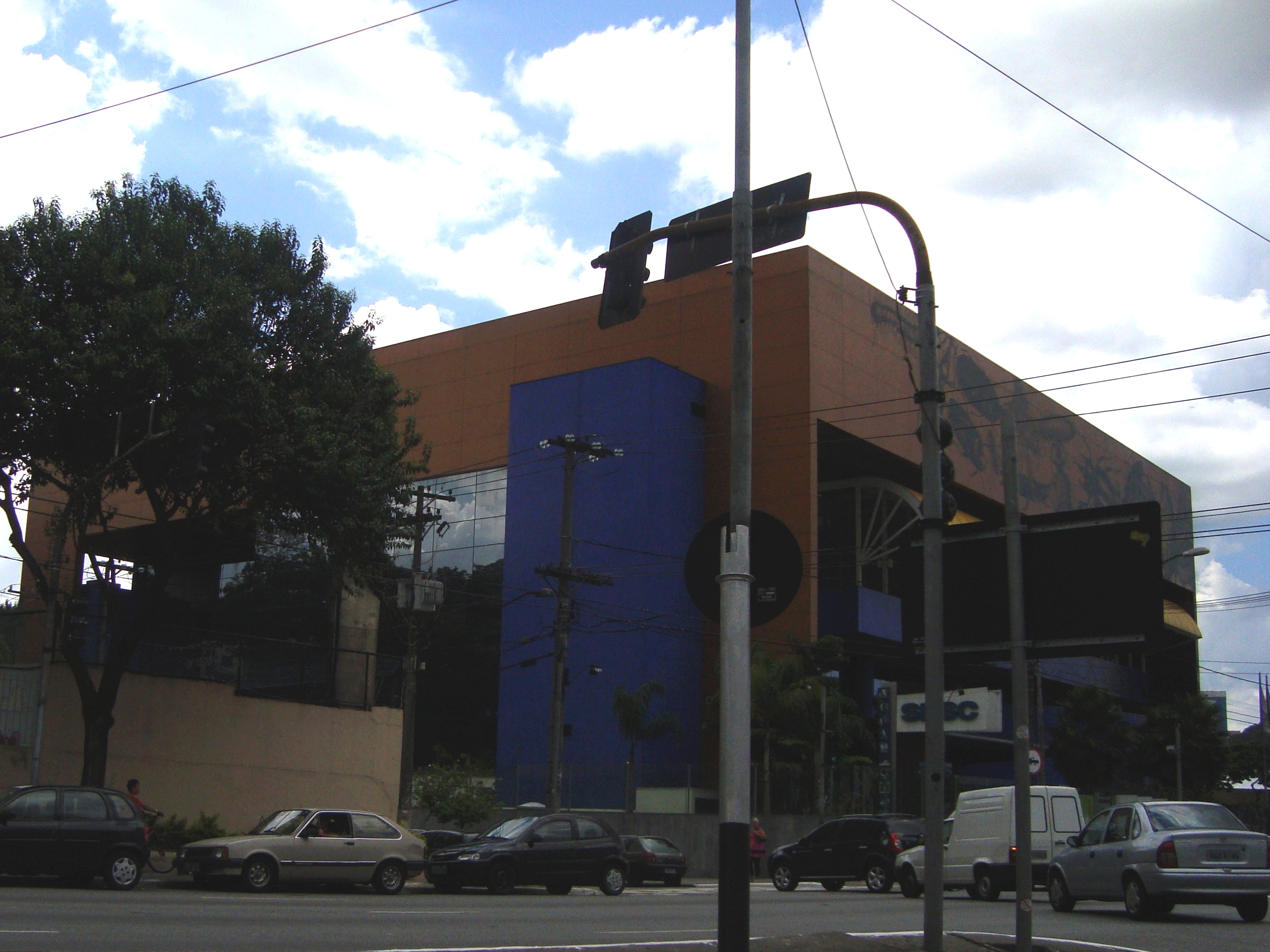 Foto do SESC SANTANA e a Av. Nova (Luis Dumont Villares)